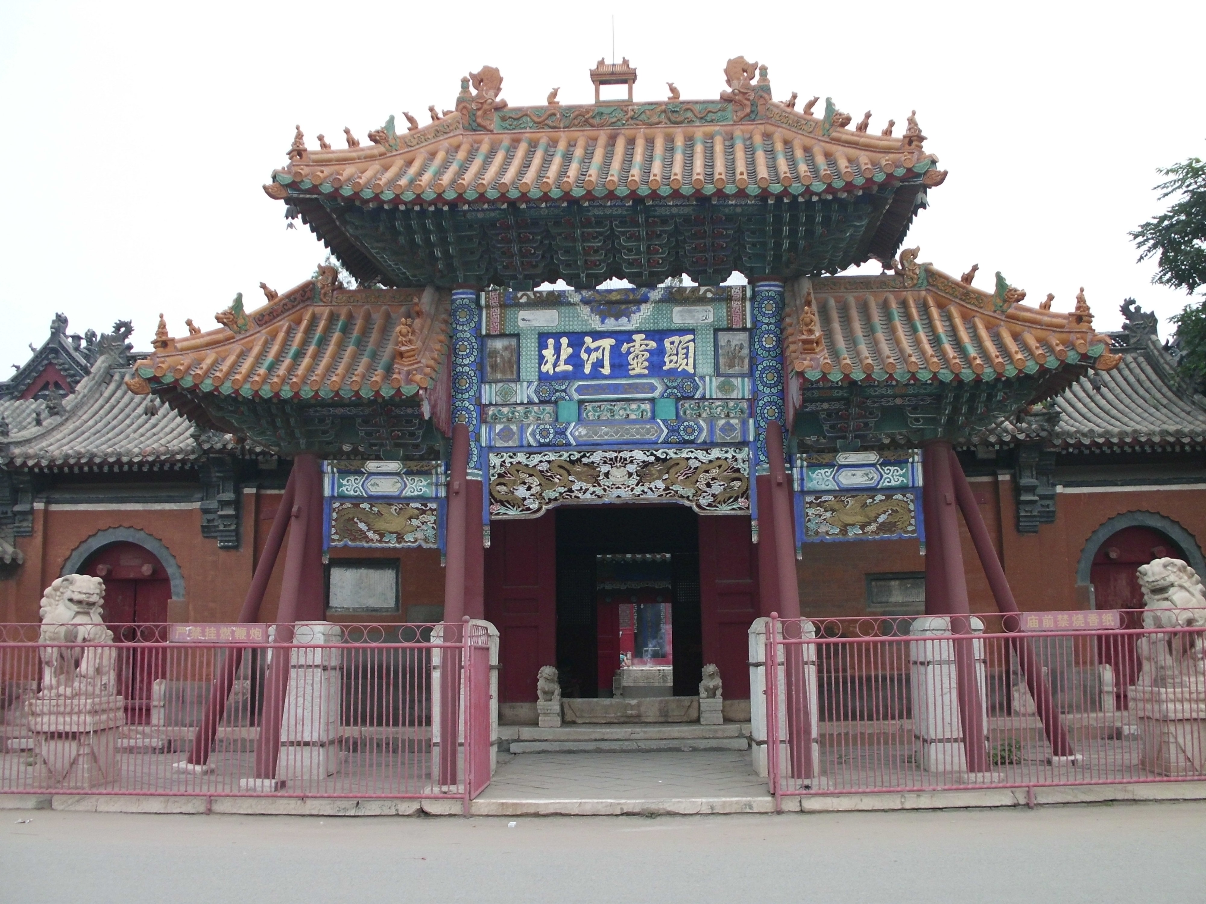 Yaowangmiao,Anguo